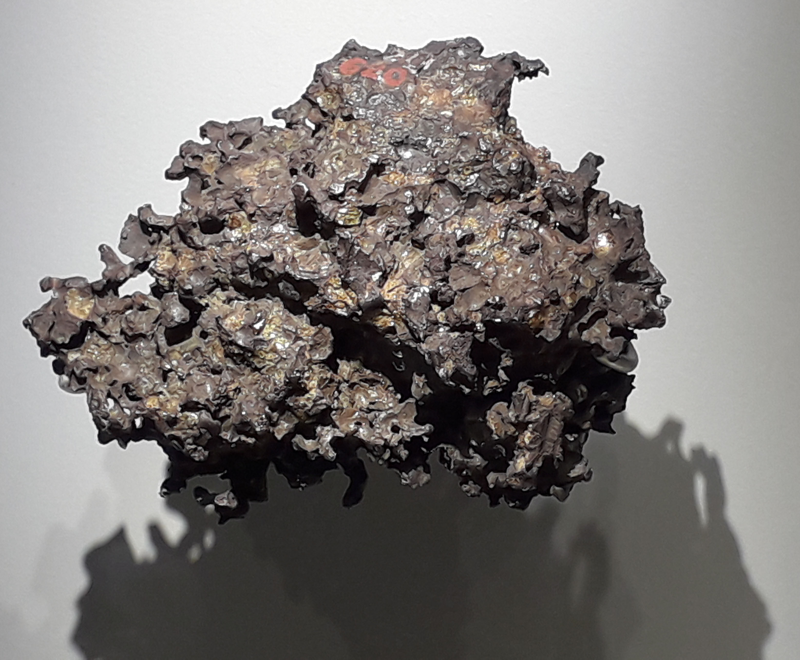 Météorite Krasnoïarsk, tombée en 1749 en Russie. Météorite mixte (pallasite). Exposée à Paris à l'occasion de l'exposition "Météorites", dans le bâtiment de la grande galerie de l'Evolution, au Muséum national d'histoire naturelle de Paris (18 octobre 2017 - 10 juin 2018).